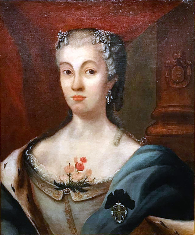 Беларуская (тарашкевіца): Партрэт Тэклі Ружы Вішнявецкай (Tekla Ruža Višniavieckaja) з роду Радзівілаў (Radzivił)